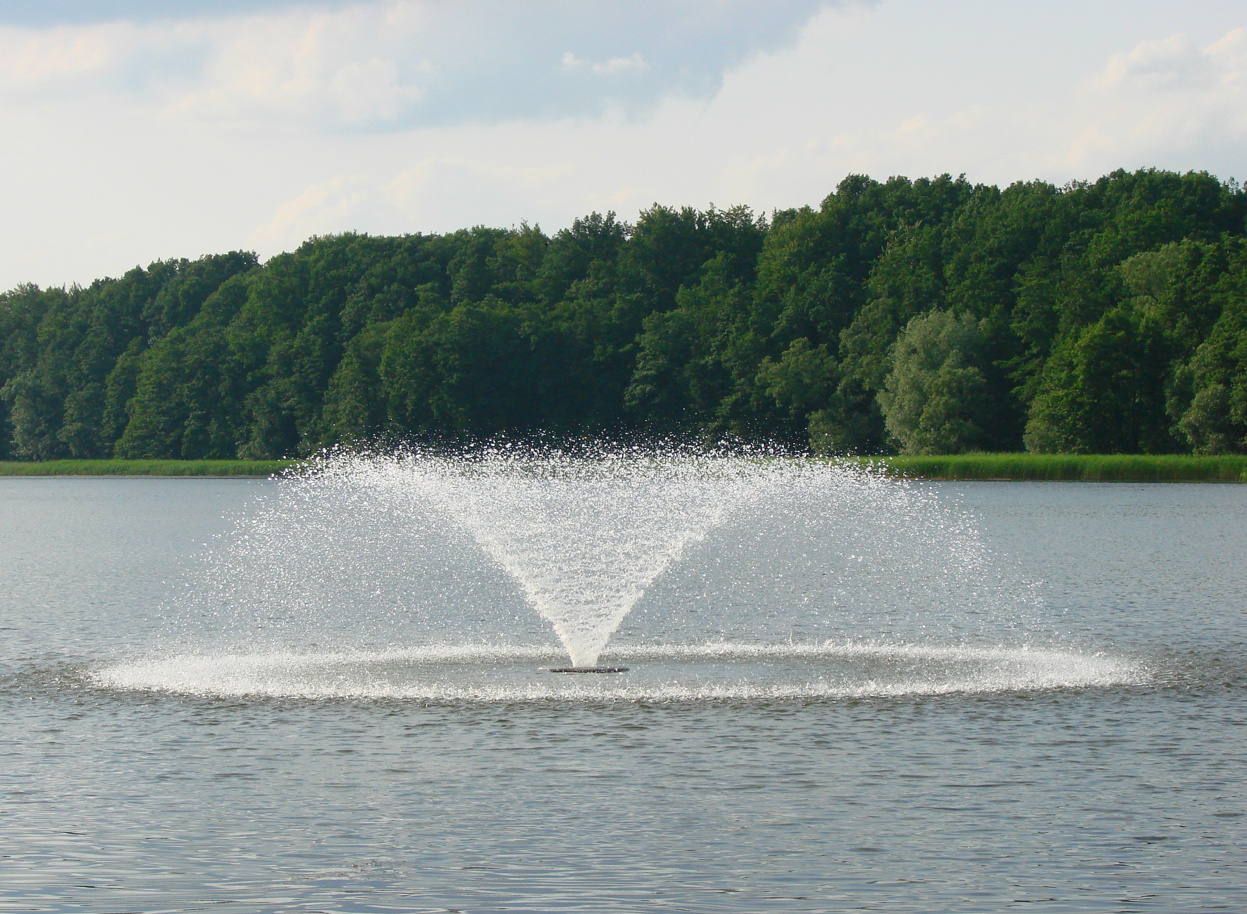 Fontanna na Jeziorze Sępoleńskim, przy Molo w Sępólnie Krajeńskim. Place in Sępólno Krajeńskie, Sępoleńskie Lake, Poland.